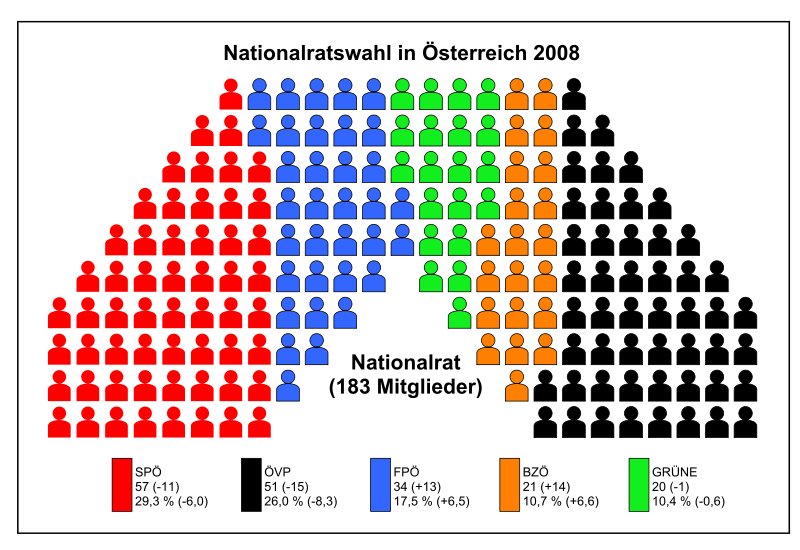 distribuzione dei seggi nationalrat elezioni nazionali austriache 2008